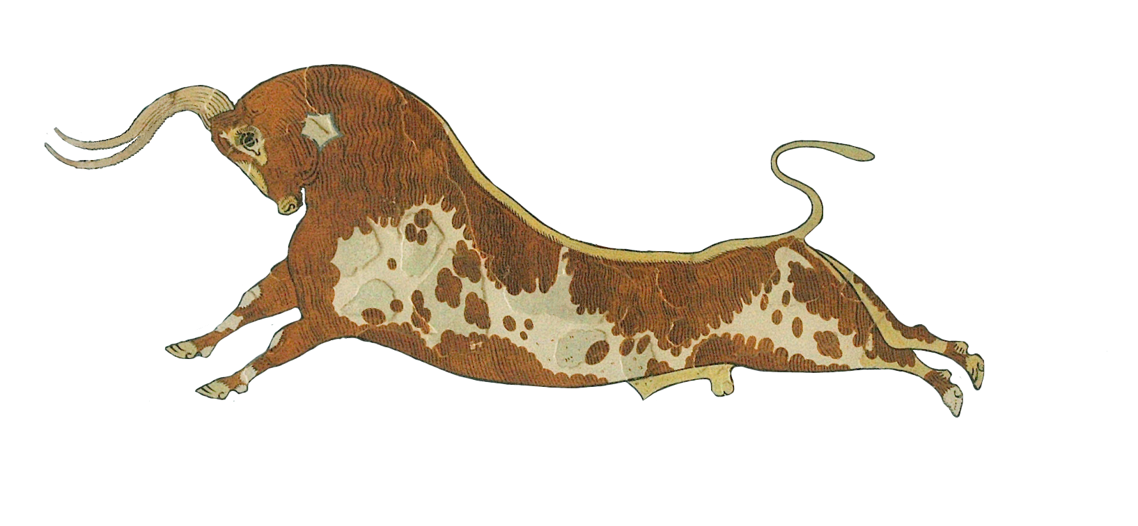 Schéma en SVG d'un auroch faite à partir de la fresque au taureau de Knossos